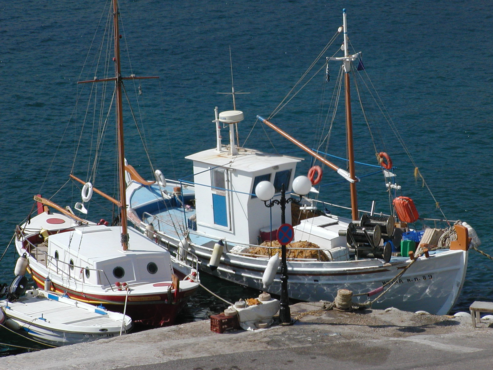 Kaiki (Καϊκι) Fisherboat in Folegandros Island, Greece